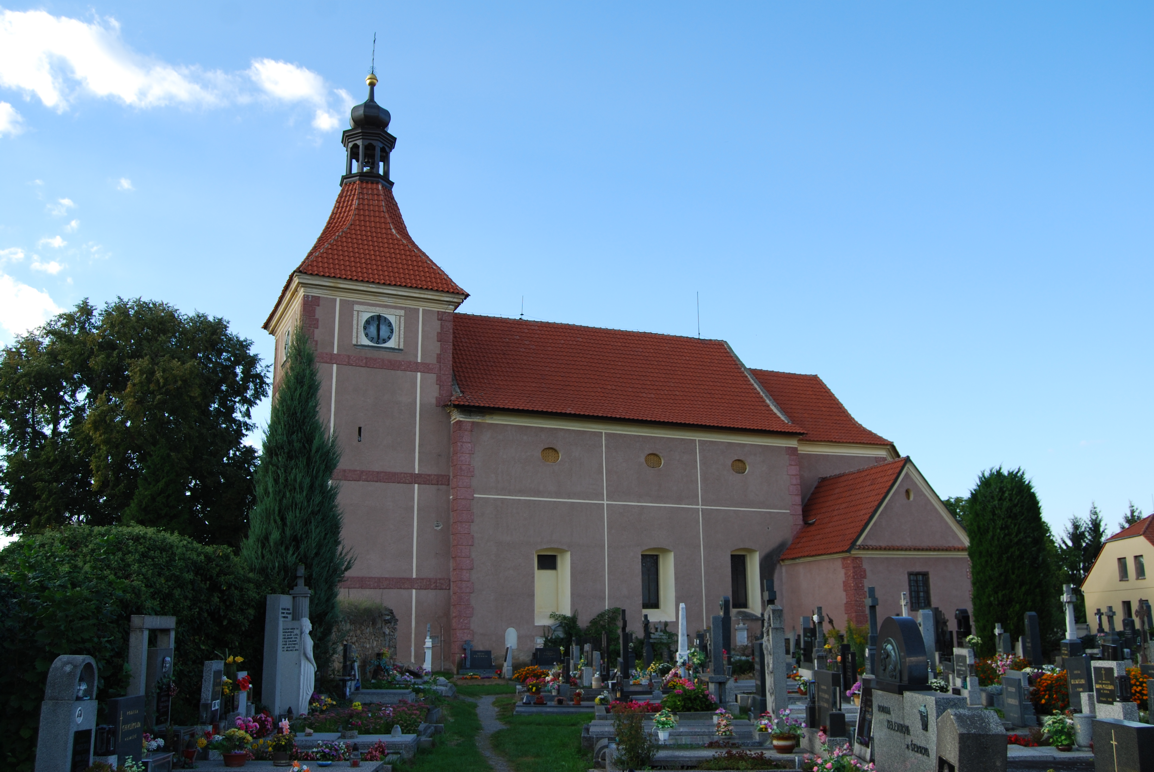 Kostel sv. Prokopa z pohledu ze hřbitova. Orlík nad Vltavou. Okres Písek. Česká republika.